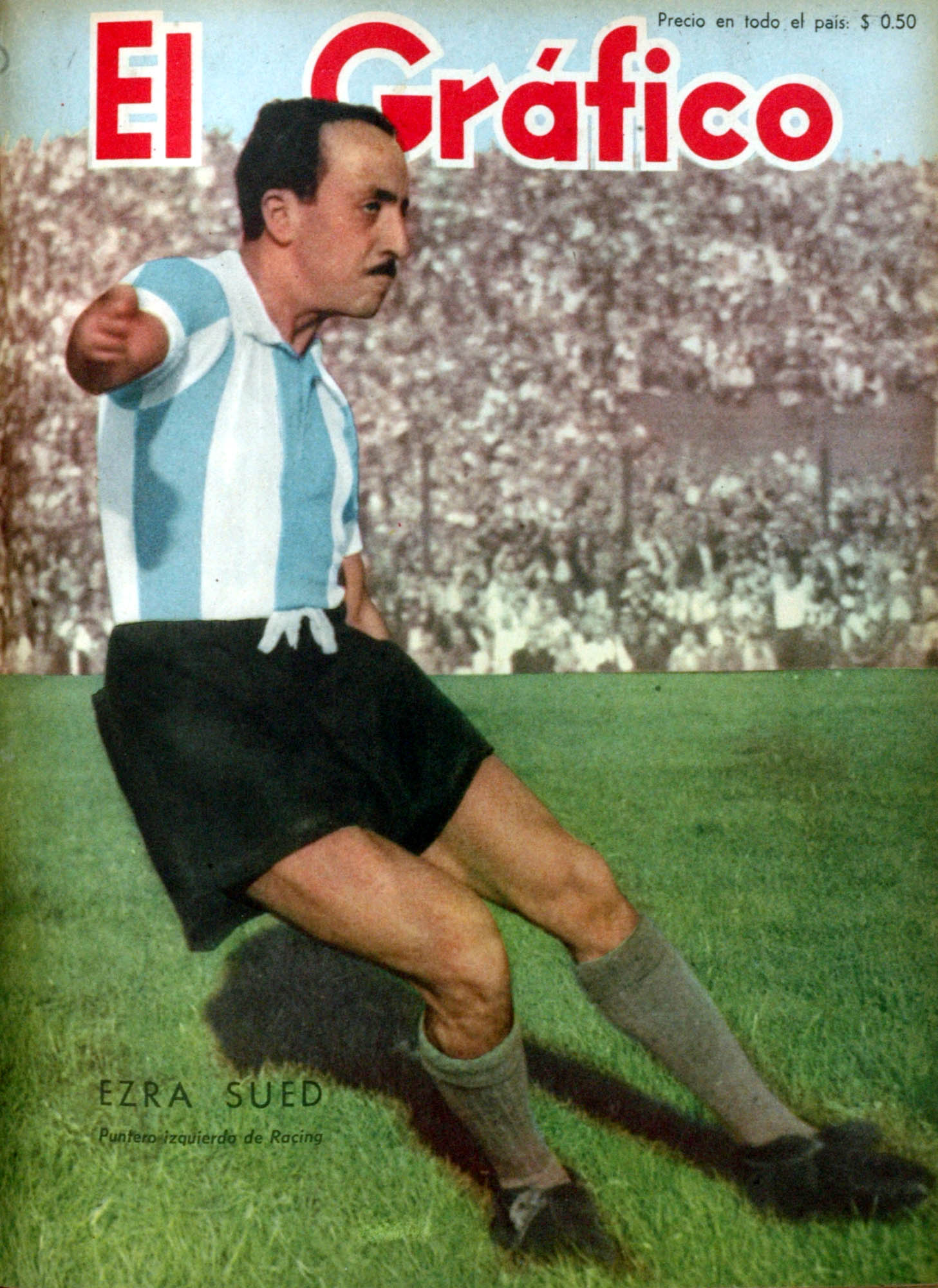 El Grafico del 30 de Junio de 1950. Edicion 1612